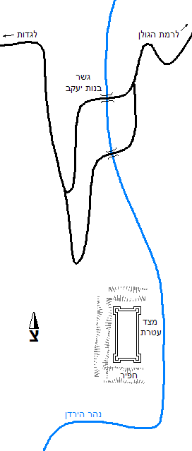 תיאור כללי של אזור מצד עתרת וגשר בנות יעקב.יצרתי באפריל 2006 בעזרת תוכנת "צייר" של חלונות.האיור אינו בקנה מידה.אסף.צ 19:48, 2 אפריל 2006 (UTC)